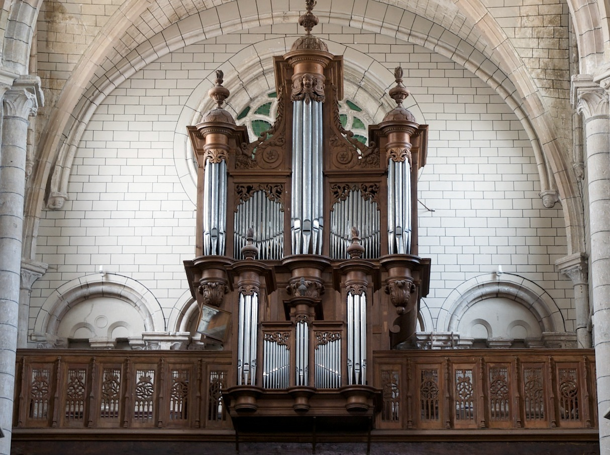 Joinville (Haute-Marne, Champagne-Ardenne, France), église de la Nativité de Notre-Dame, les grandes orgues et leur buffet construits en 1688 pour le palais des comtes de Champagne à Troyes par Louis Le Bé qui les transfère à Joinville en 1698, partie instrumentale reconstruite en 1837 par Jean-Baptiste Gavot, le tout restauré en 1981 par Jean-Georges & Yves Koenig.